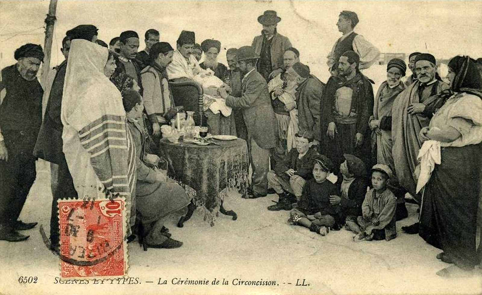 Cérémonie de la circonsition